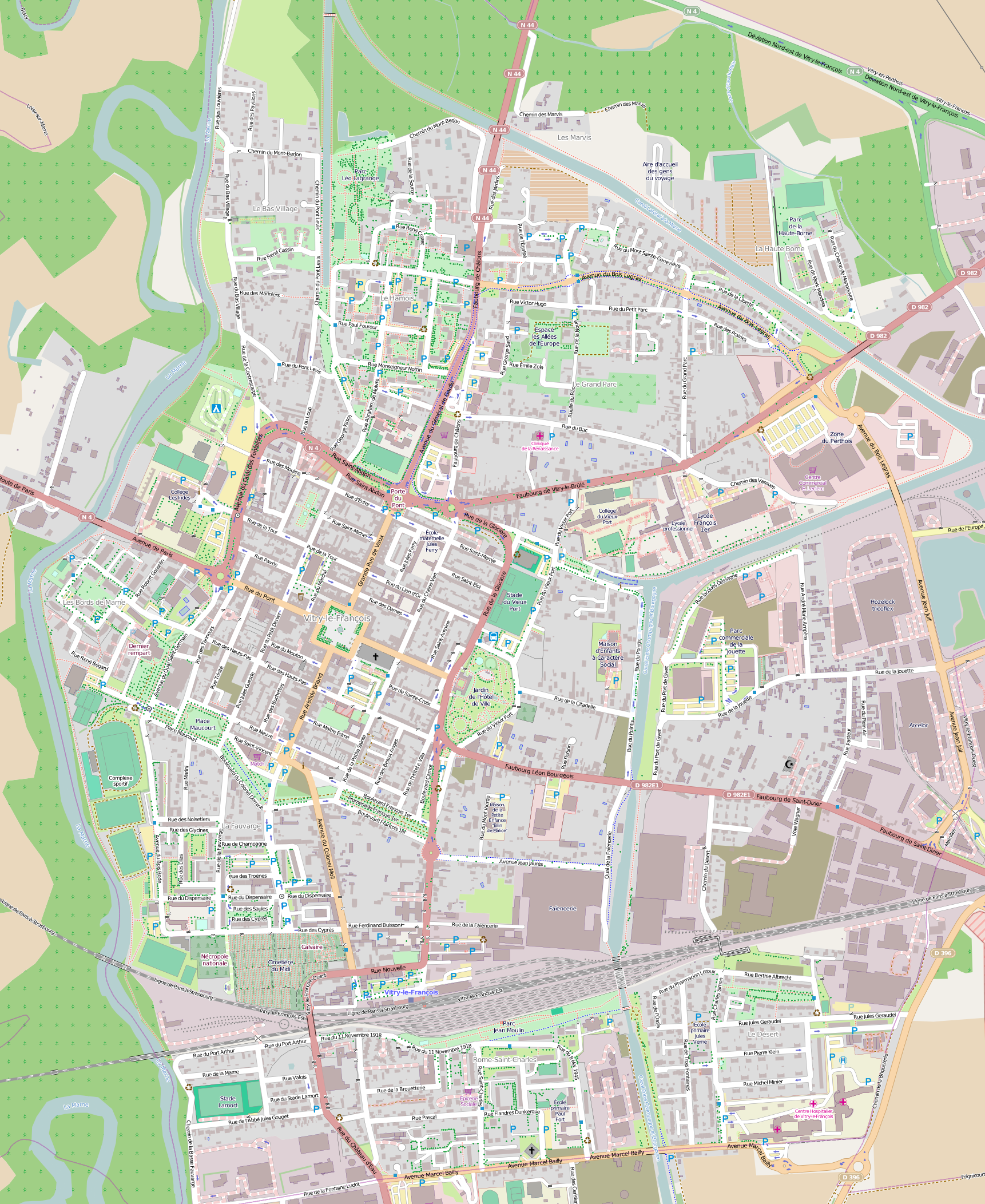 Plan de Vitry-le-François (51300). Cette carte de Vitry-le-François a été créée à partir des données du projet OpenStreetMap. Cette carte est peut-être incomplète et peut contenir des erreurs. Ne vous fiez pas uniquement à elle pour vos déplacements.